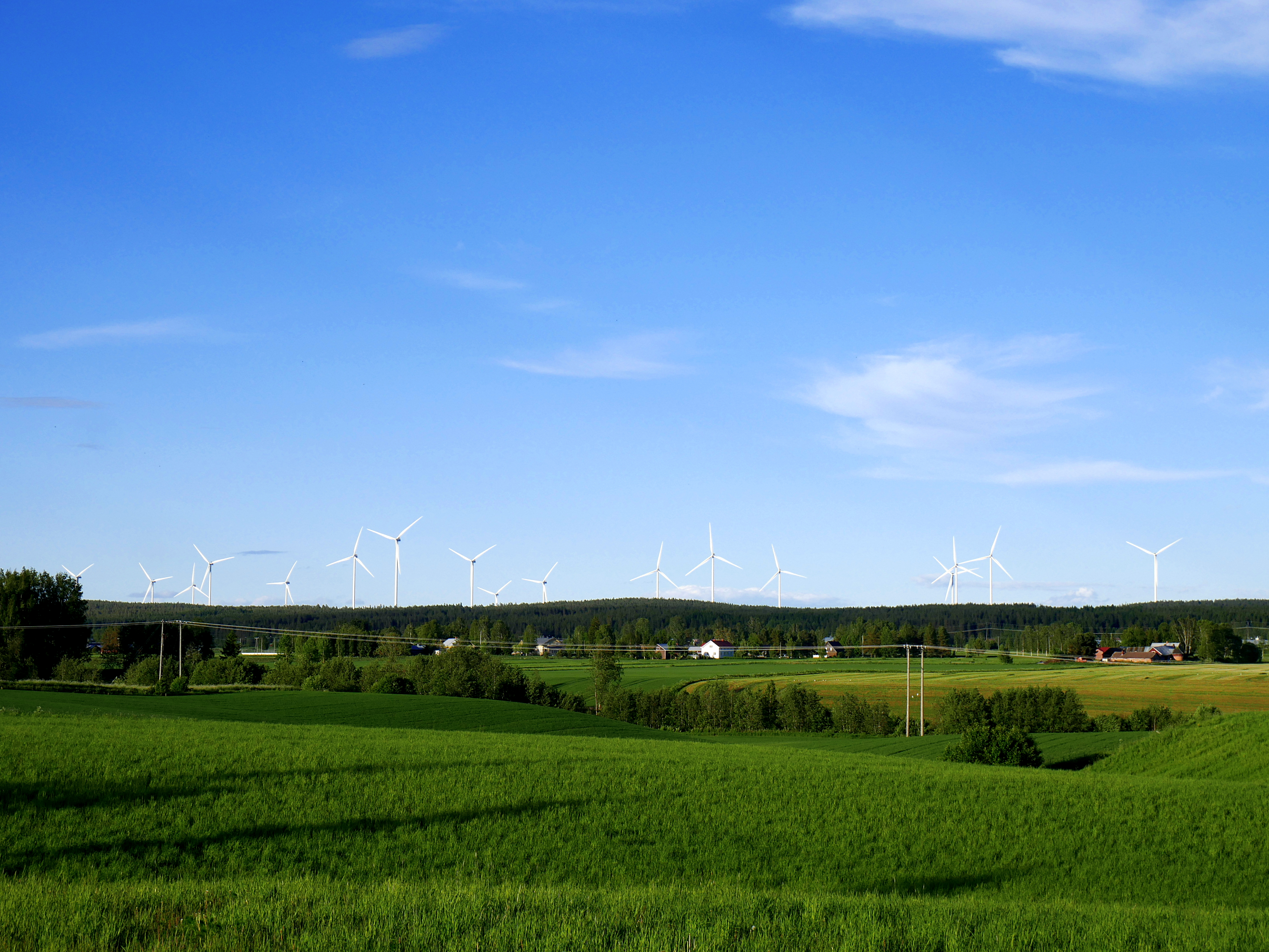 Tuulivoimaloita kuvattuna Kurikassa.